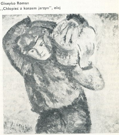 It's my own faithful copy of picture from following publication (in Polish): "Artyści Plastycy Okręgu Warszawskiego ZPAP, ed.. Okręg Warszawski Związku Polskich Artystów Plastyków, Warszawa, 1972", p.149